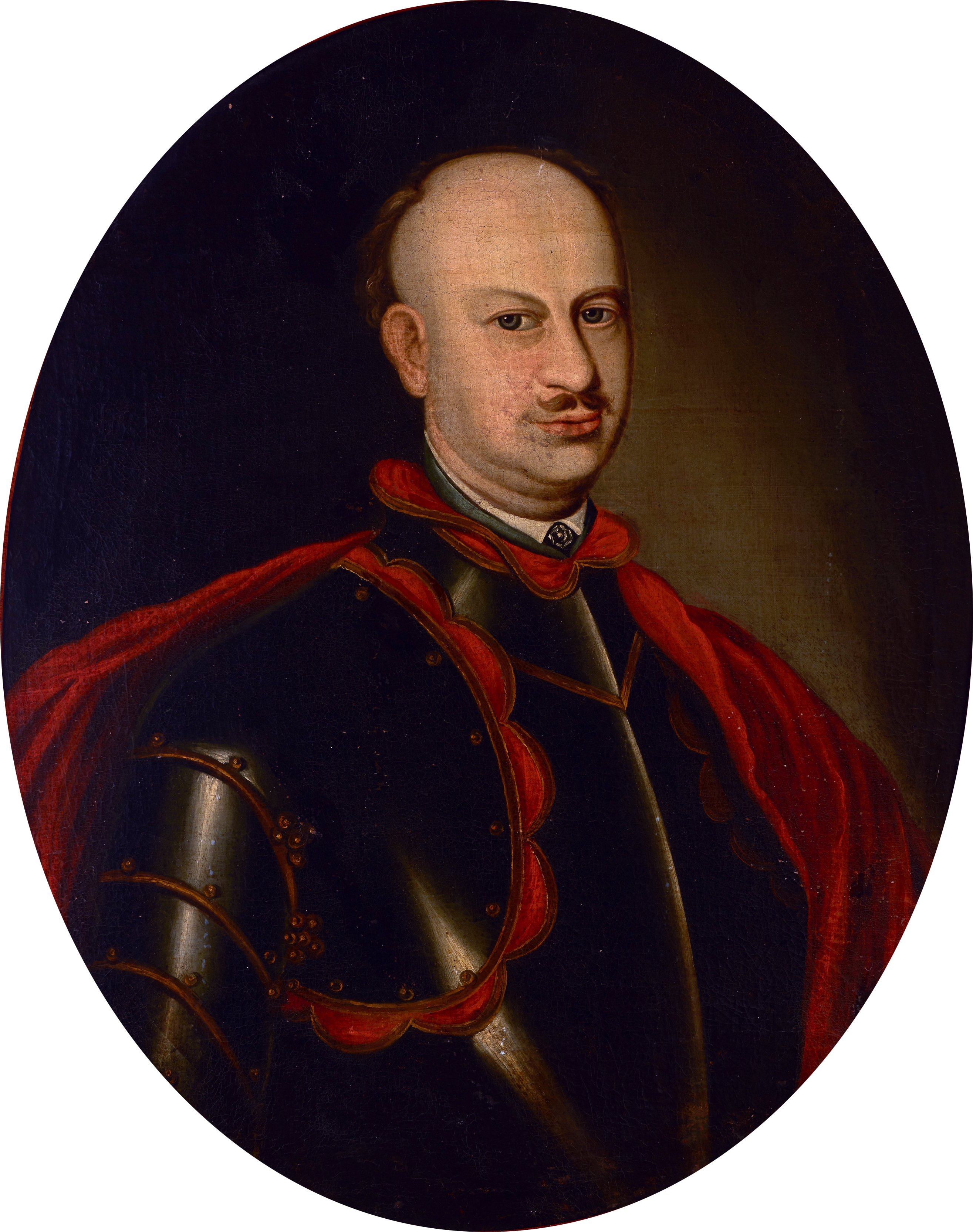 Беларуская (тарашкевіца): Партрэт Антонія Пацея (Antoni Paciej), стражніка літоўскага